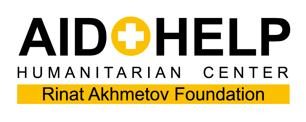 Logotype of the Humanitarian Center